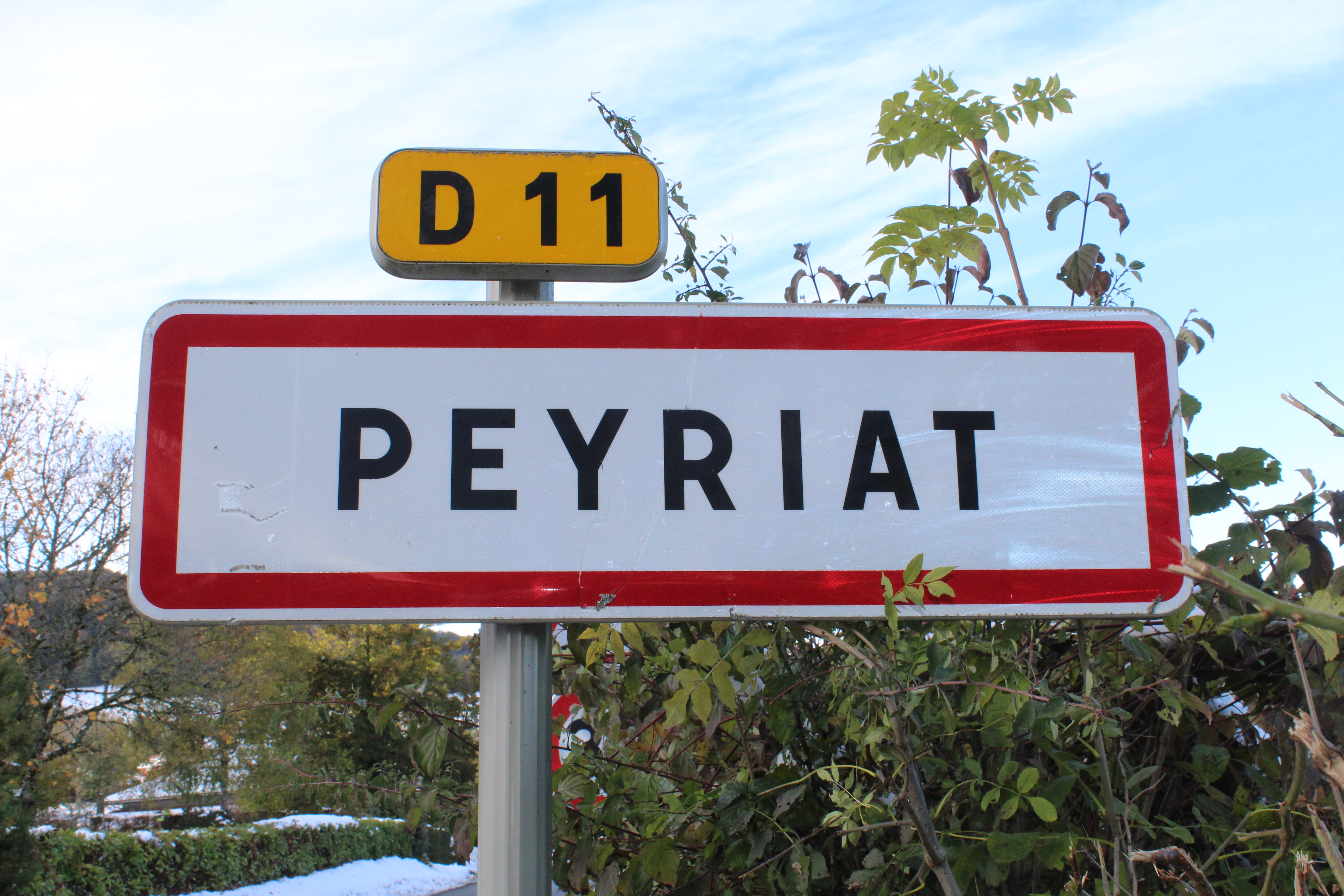 Panneau d'entrée dans Peyriat.